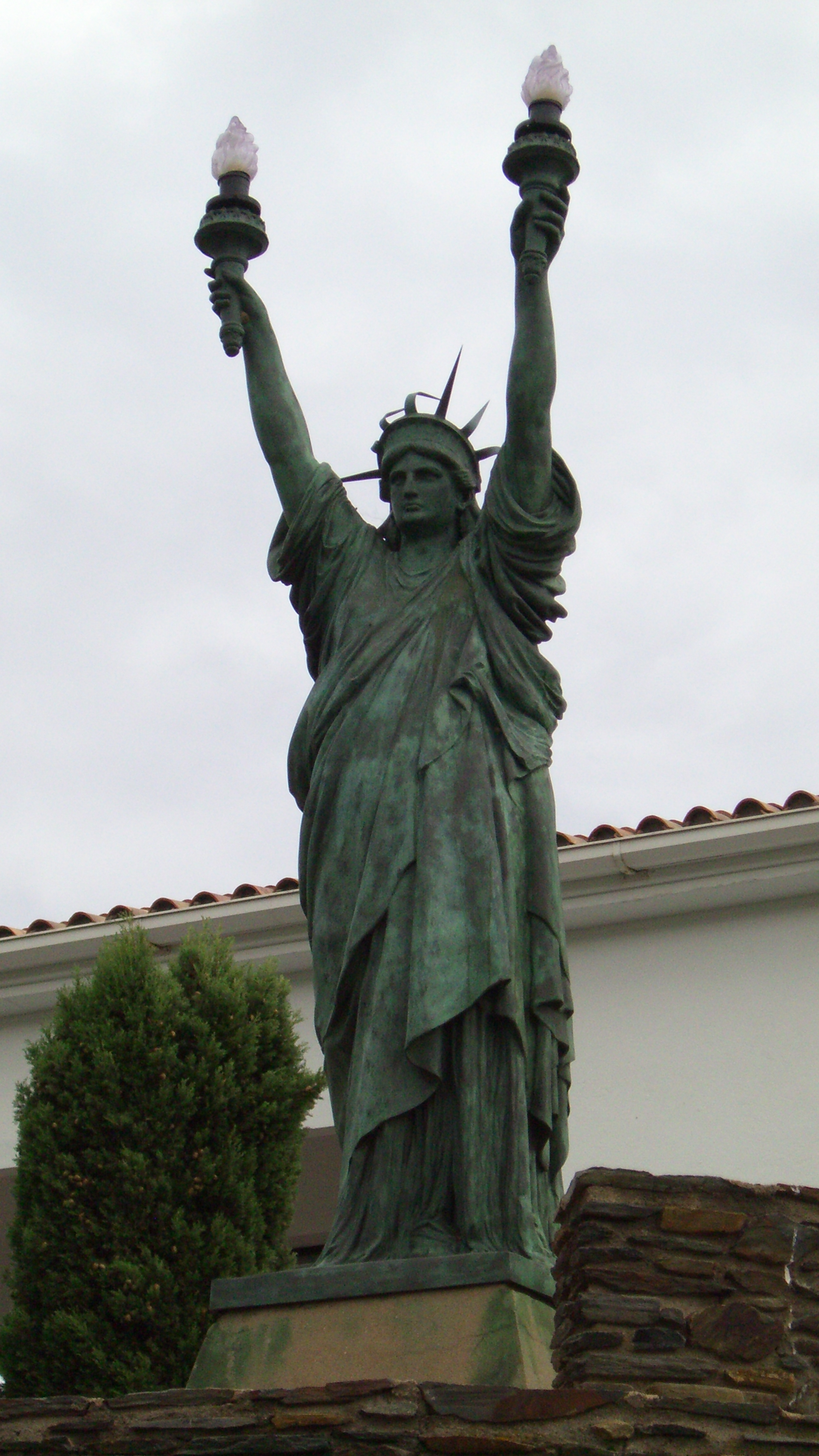 Estatua de la libertad en Cadaqués - de cerca